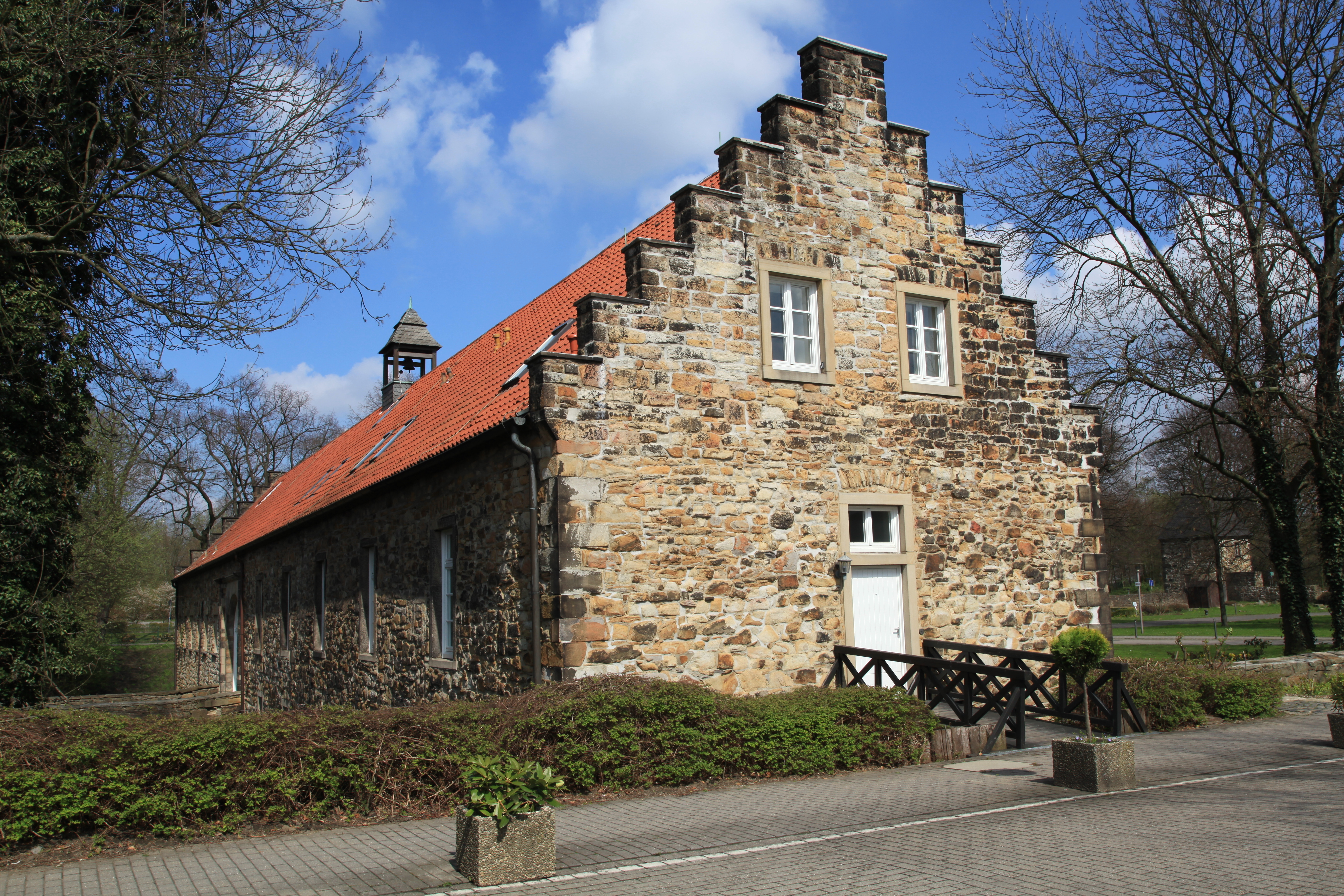 Langhaus von Haus Langendreer, jetzt Verwaltungsgebäude der LWL-Schulen, Am Leithenhaus in Bochum-Langendreer